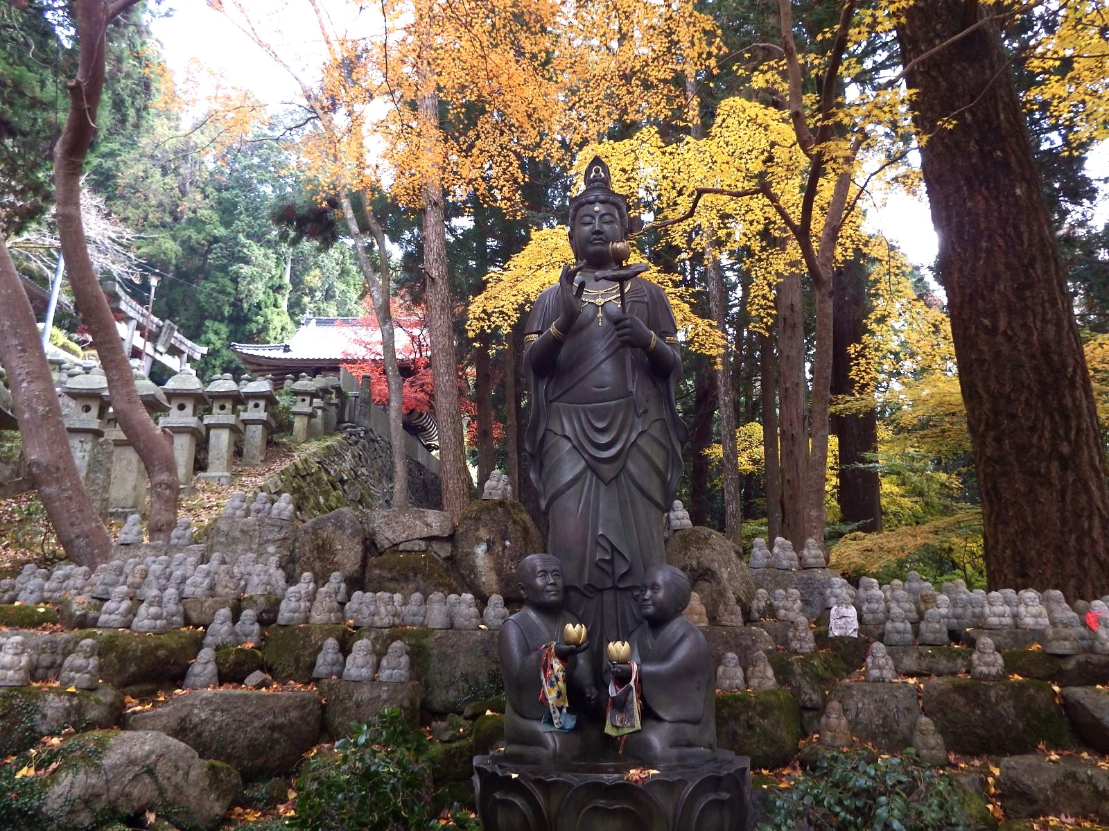 箸蔵寺の観音像